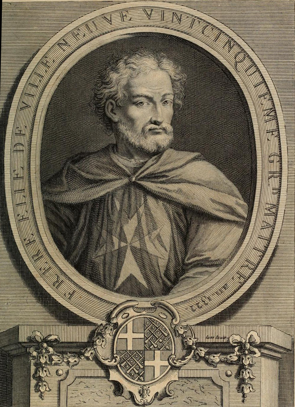 grand maître de l'ordre de Saint-Jean de Jérusalem